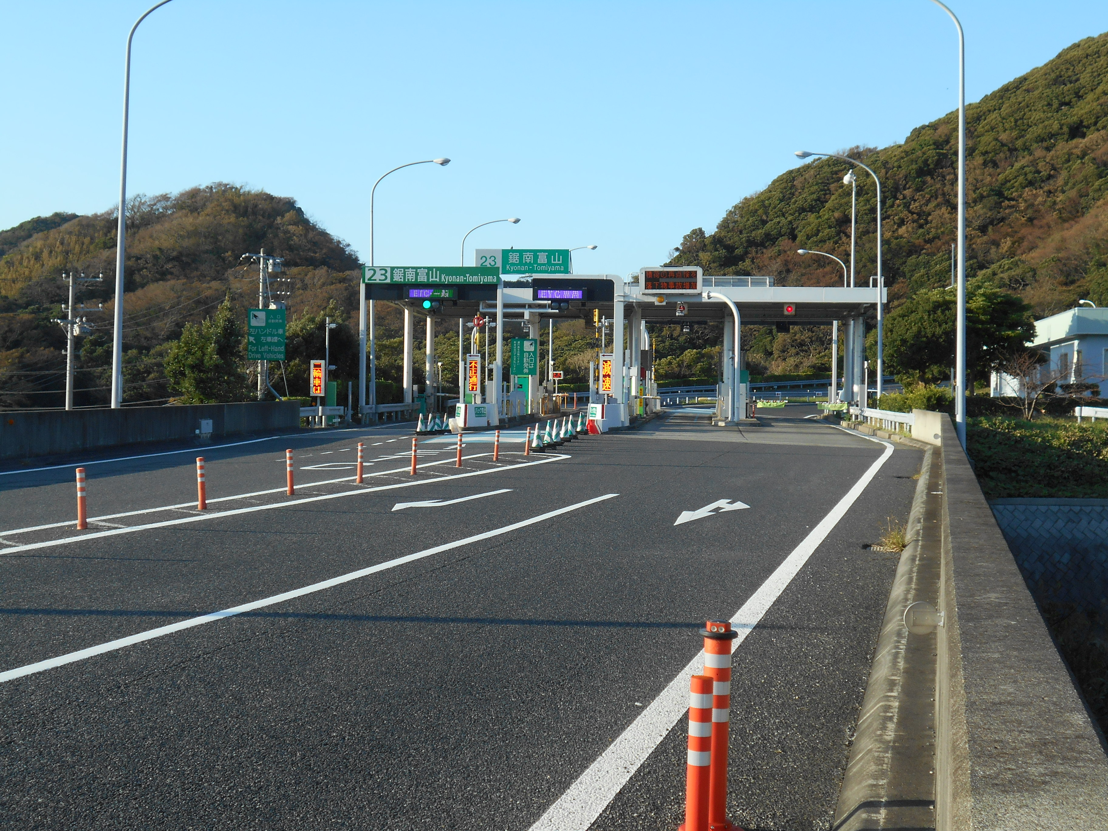 富津館山道路 鋸南富山インターチェンジ